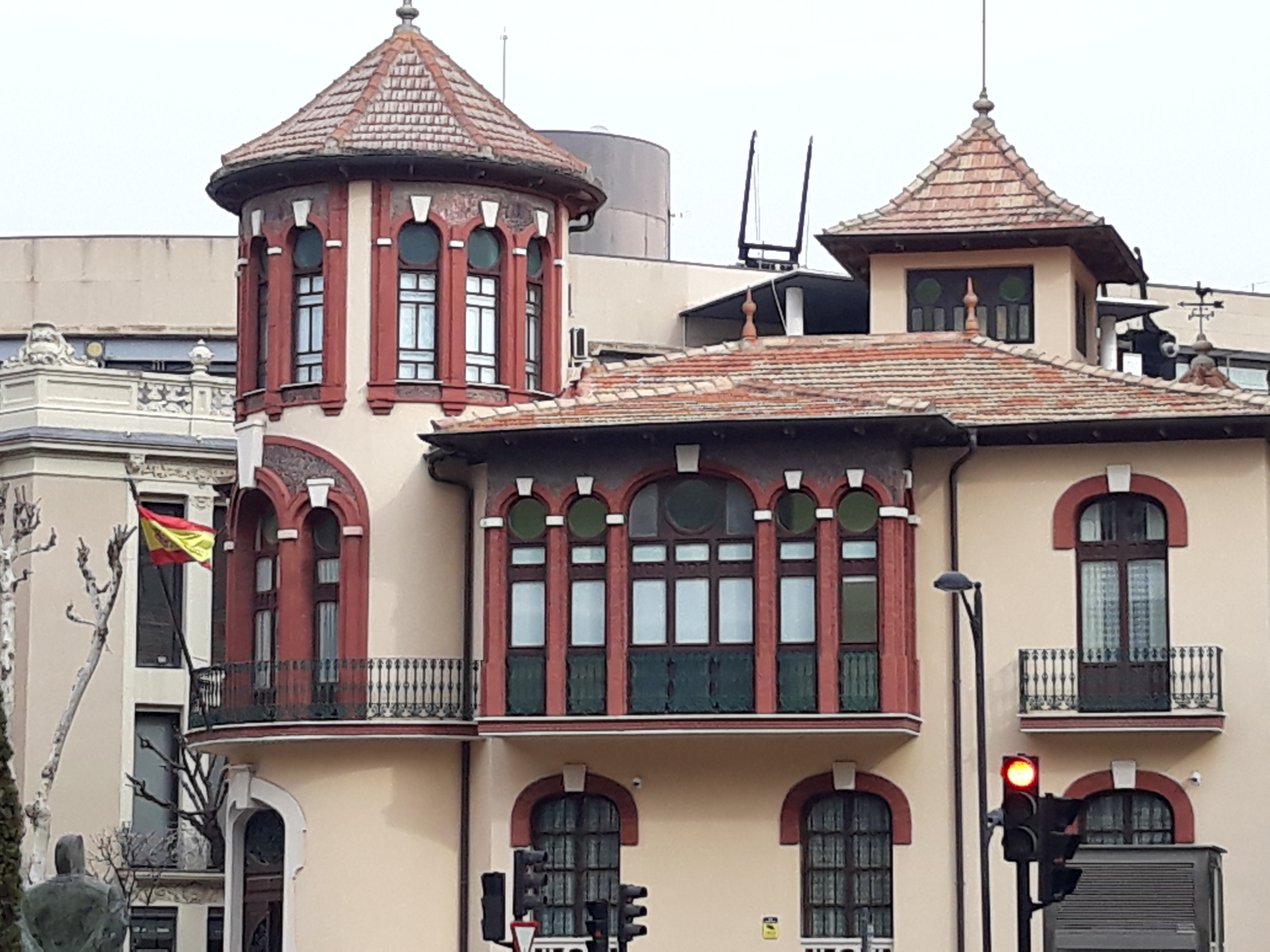 Subdelegación de Defensa de Albacete